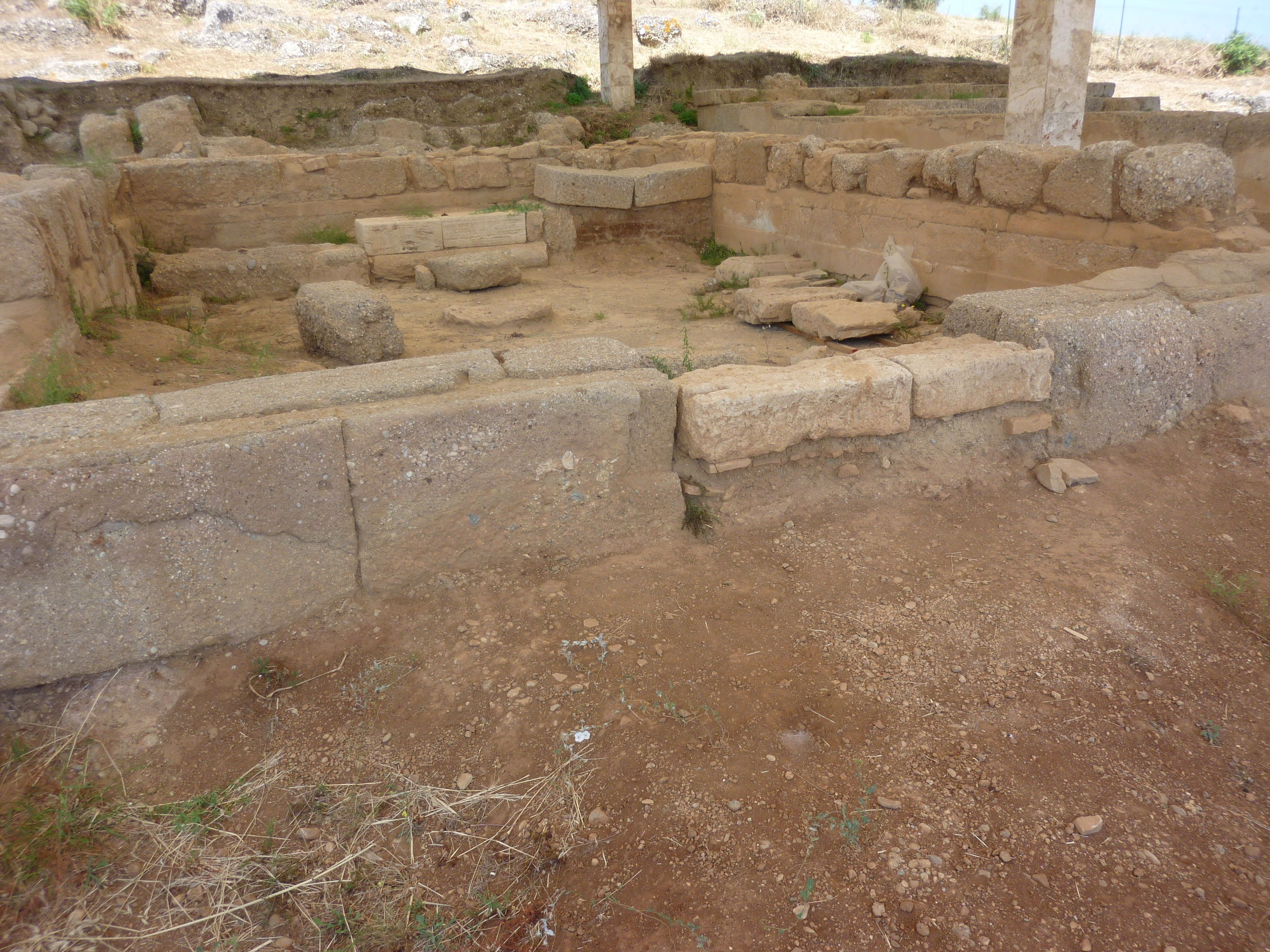 Temple jouxtant le théâtre d'Egira, Grèce